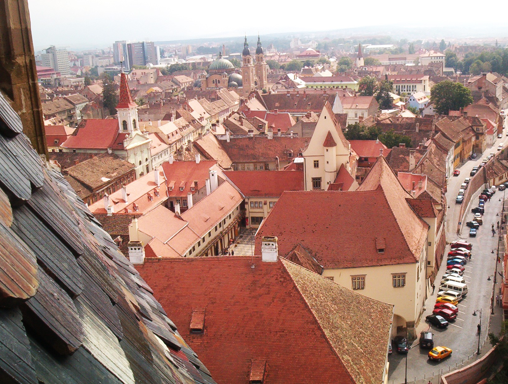 Poza a fost facuta din turnul bisericii evanghelice din Sibiu. Se pot observa muzeul de istorie, biserica reformata, catedrala ortodoxa, hotelurile Ramada si Continental, etc...